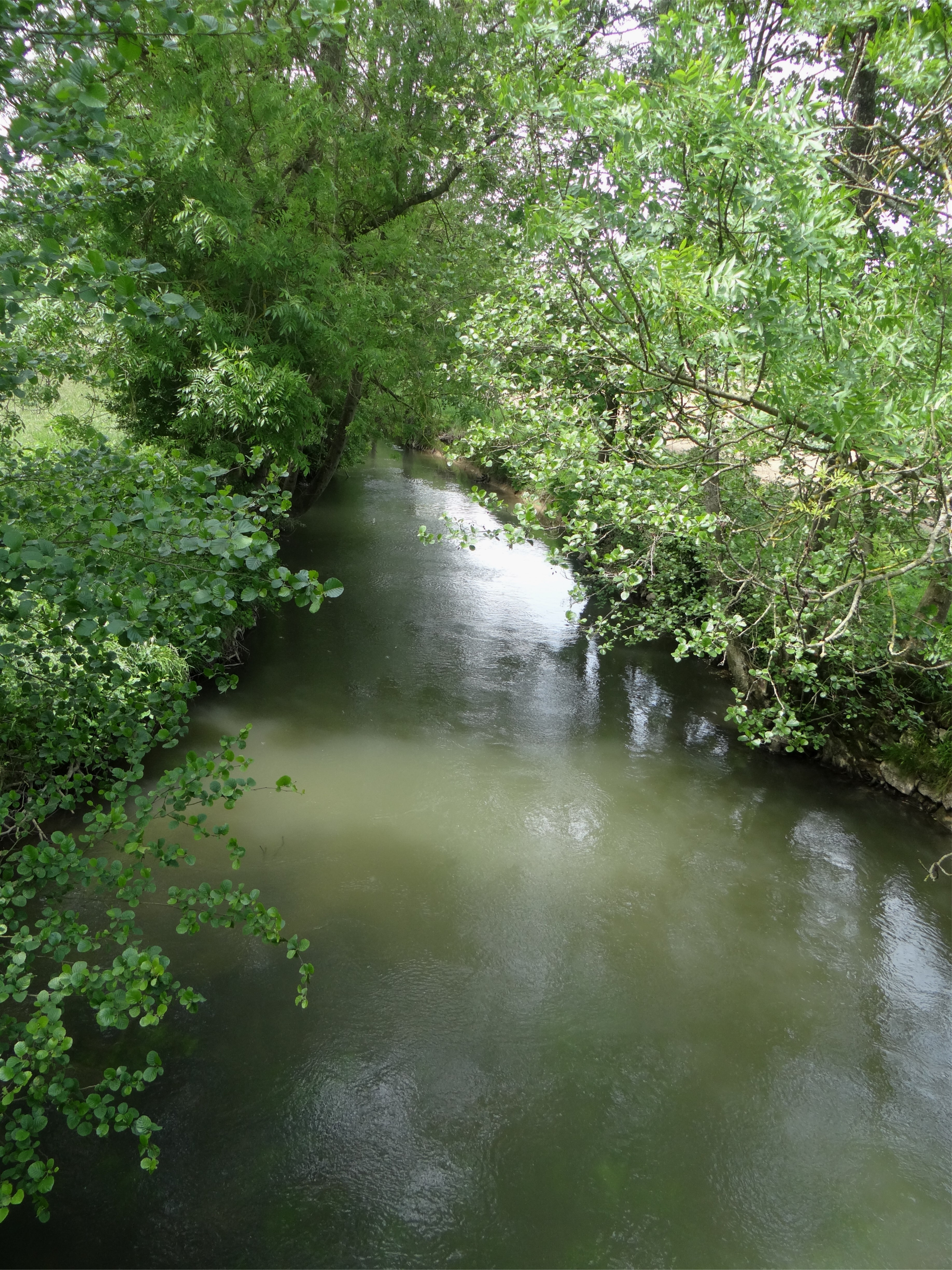 Le Petit Morin à Le Fourcheret, Villeneuve-sur-Bellot, Seine-et-Marne.France.